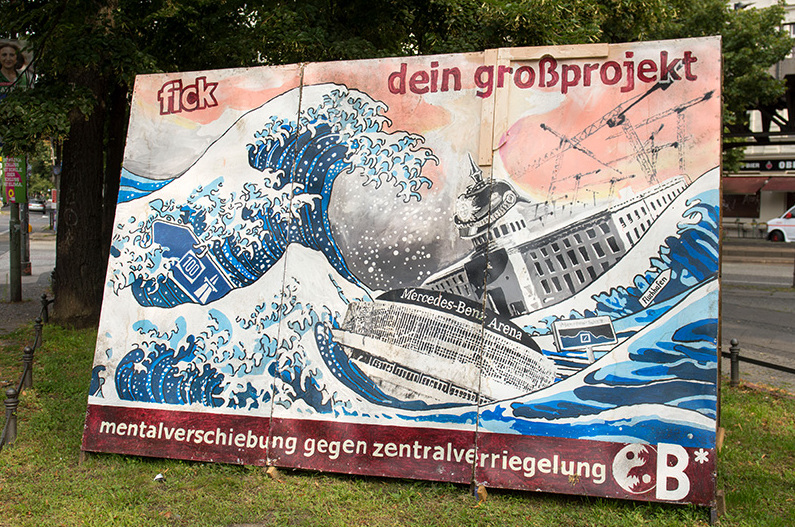 Poster "Fick dein Großprojekt" der Bergpartei